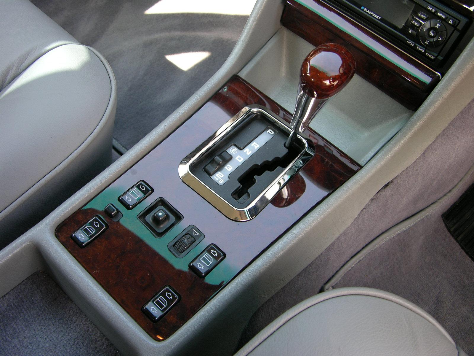 Mercedes Benz 420SEL